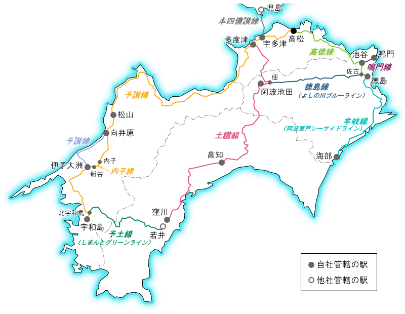 四国旅客鉄道路線図